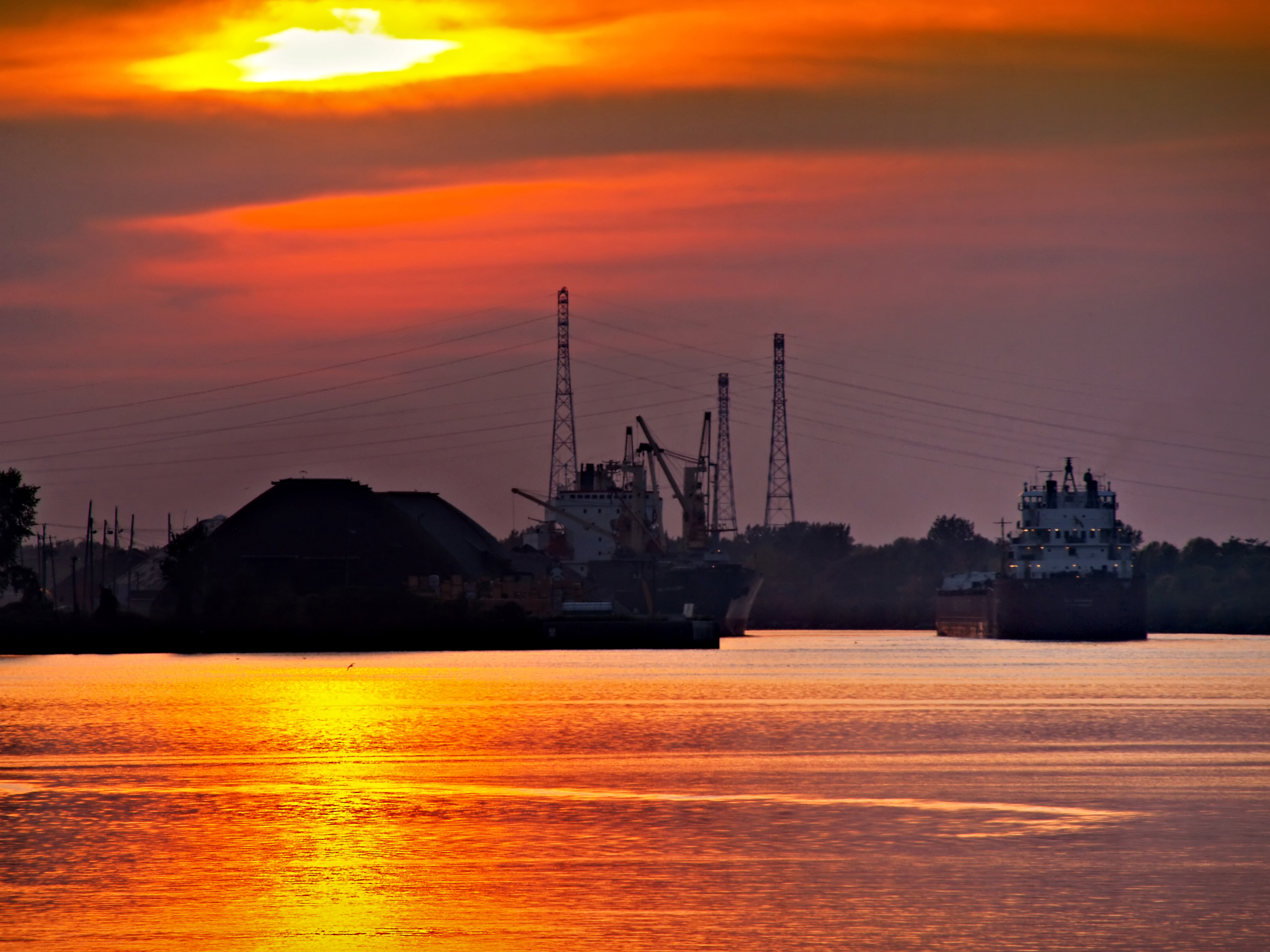 Sainte-Catherine (Québec) - Installations portuaires Boulevard Hébert. À droite, le CSL Niagara sur la voie maritime du Saint-Laurent